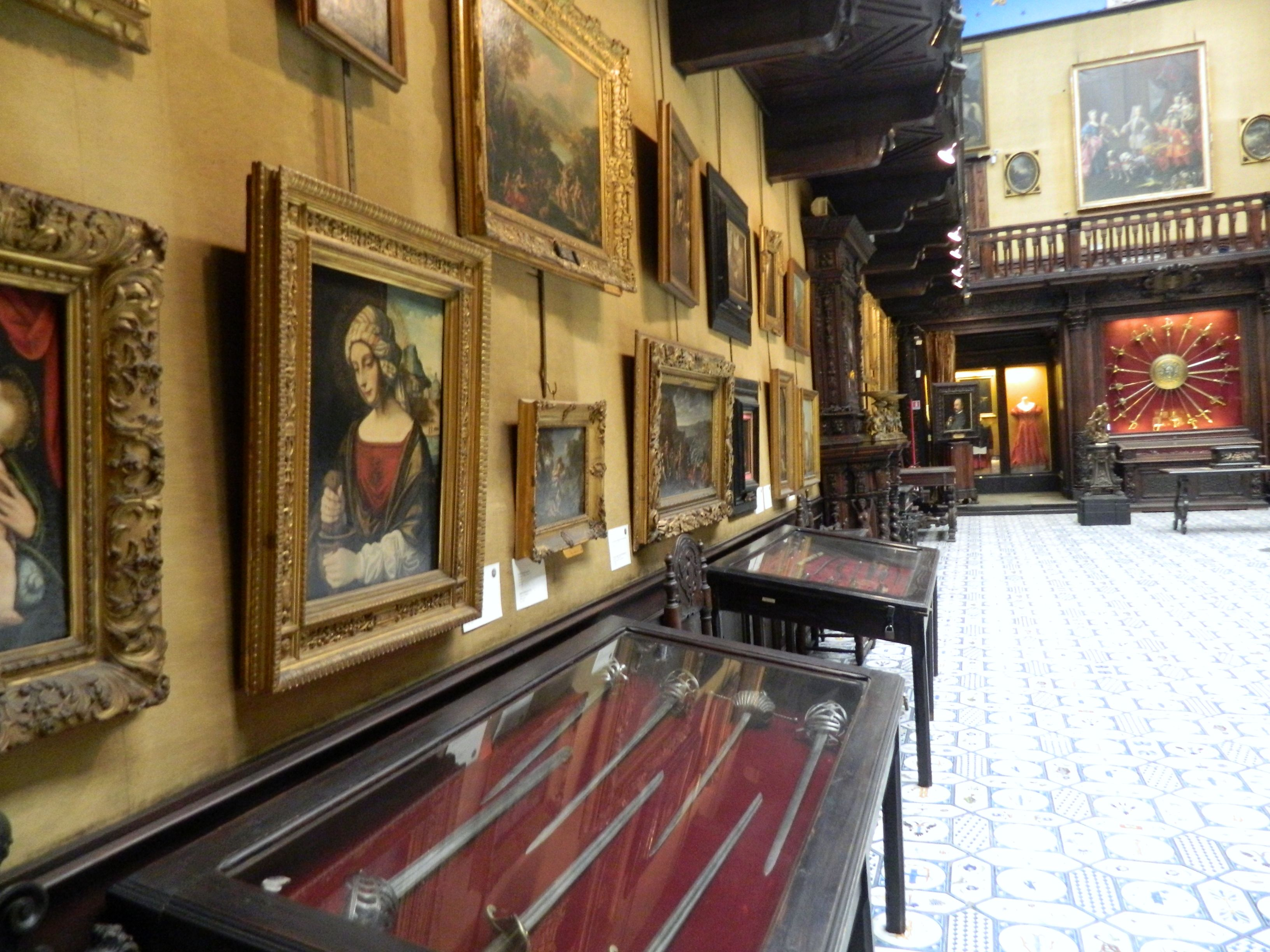 Museo Civico Gaetano Filangieri (Palazzo Como), Napoli.